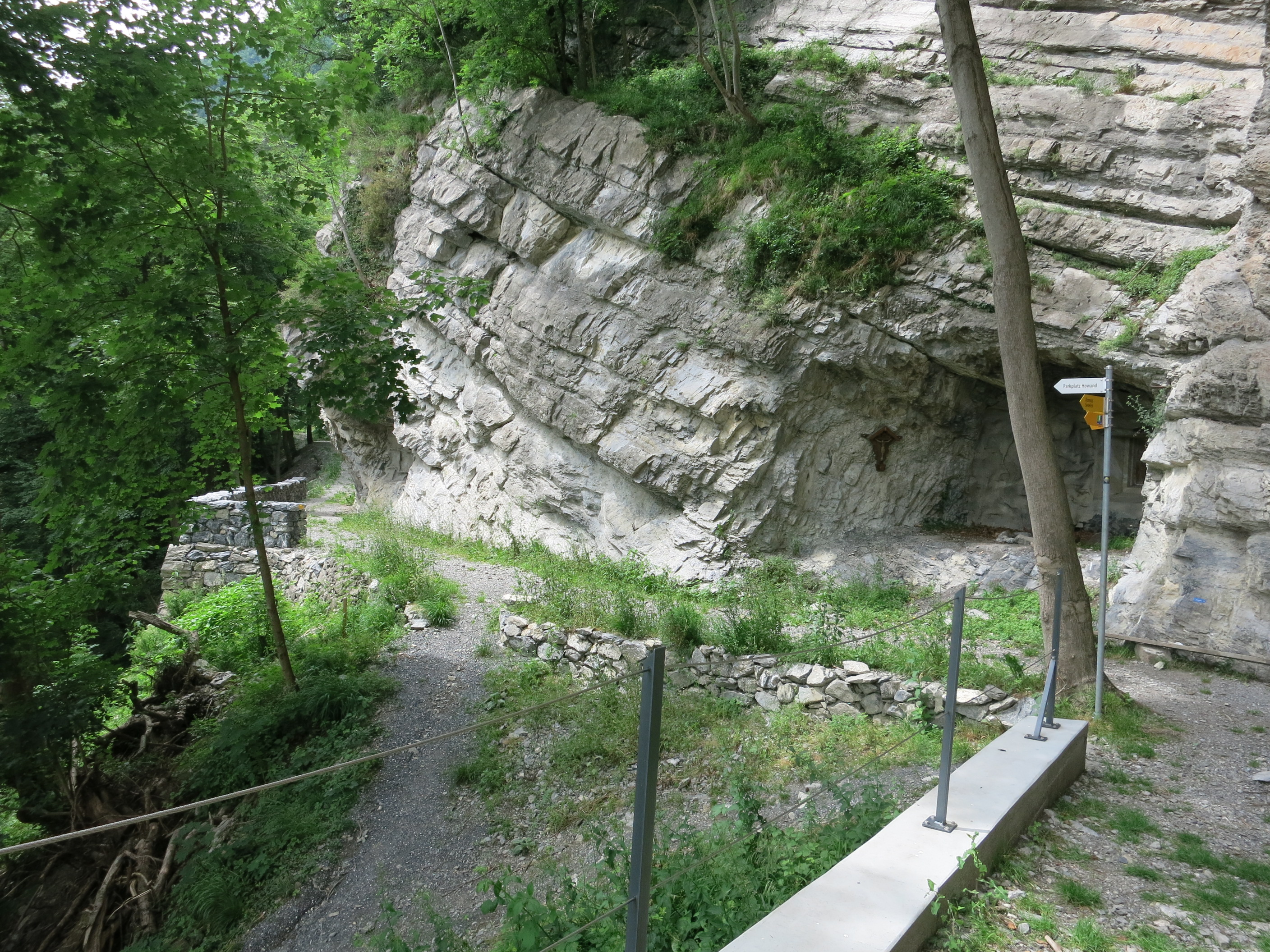 Festung Schollberg SG, Schweiz